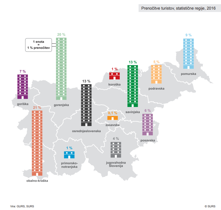 Prenočitve turistov, statistične regije, 2016